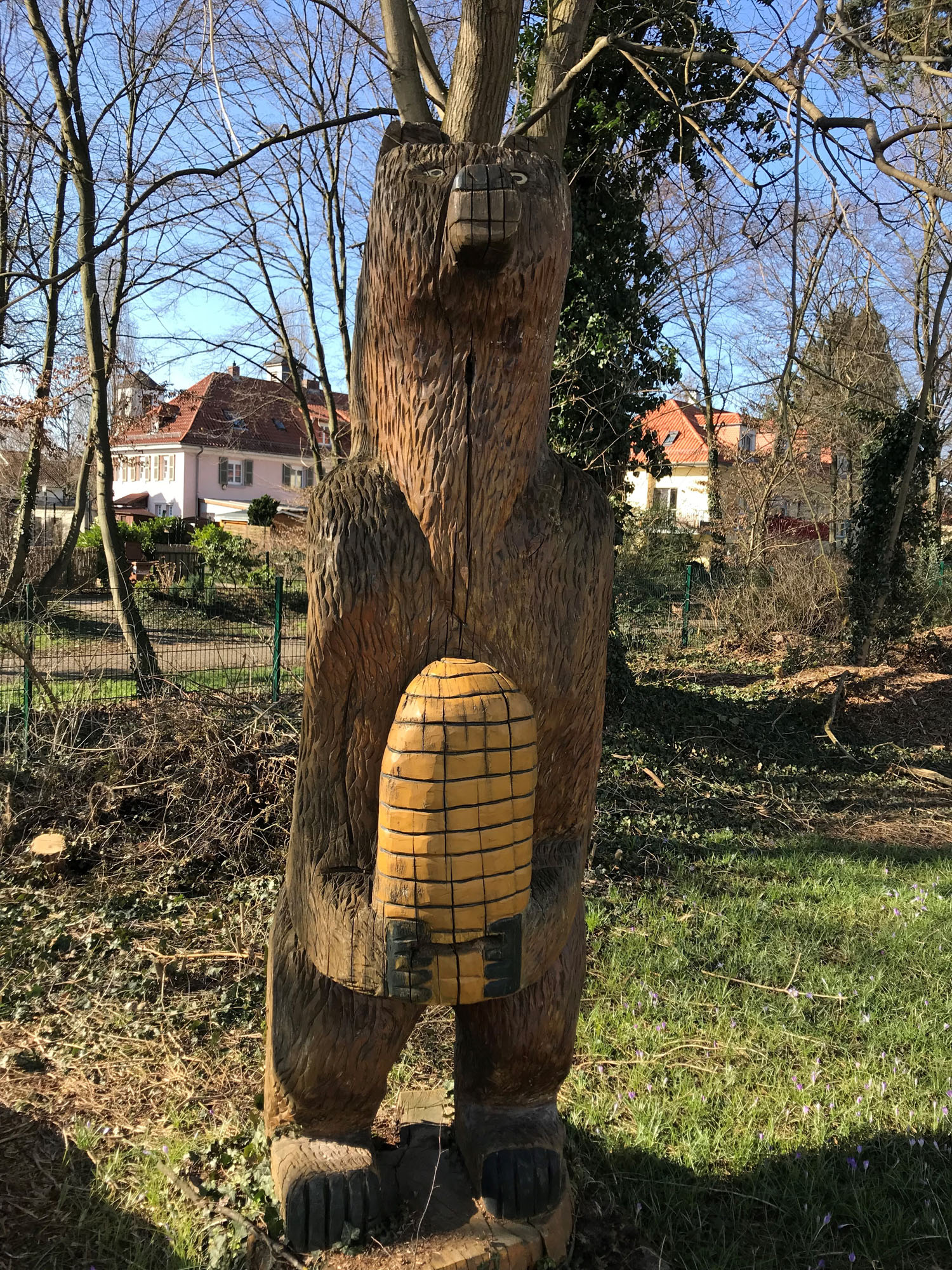 Bienenbeute aus Baumstamm. Imkerschule Heidelberg